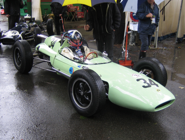 Lotus 24 Climax FWMV Pau GP 2007